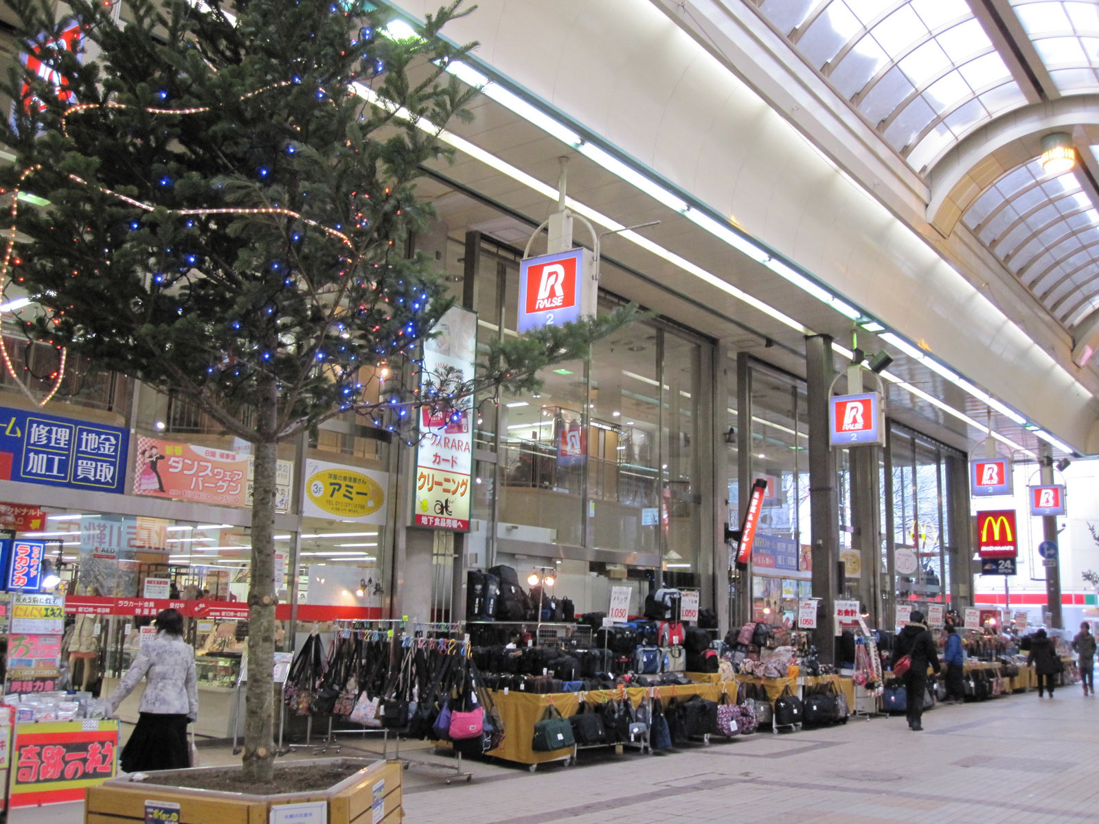 ラルズプラザ札幌店、狸小路出入口から撮影